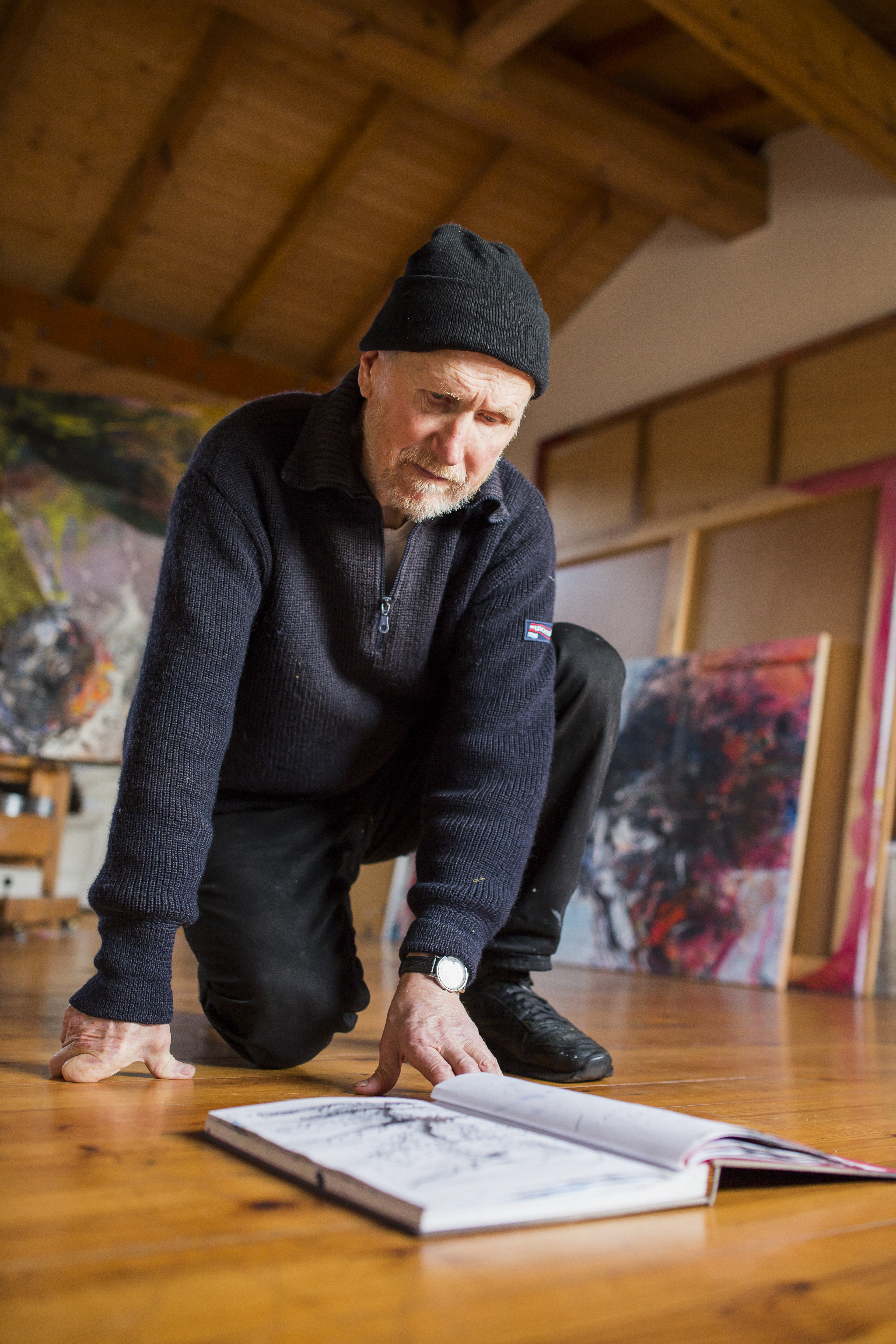 Detlef Kappeler, mit Zeichenblock. Januar 2014, Muxía (A Coruña).